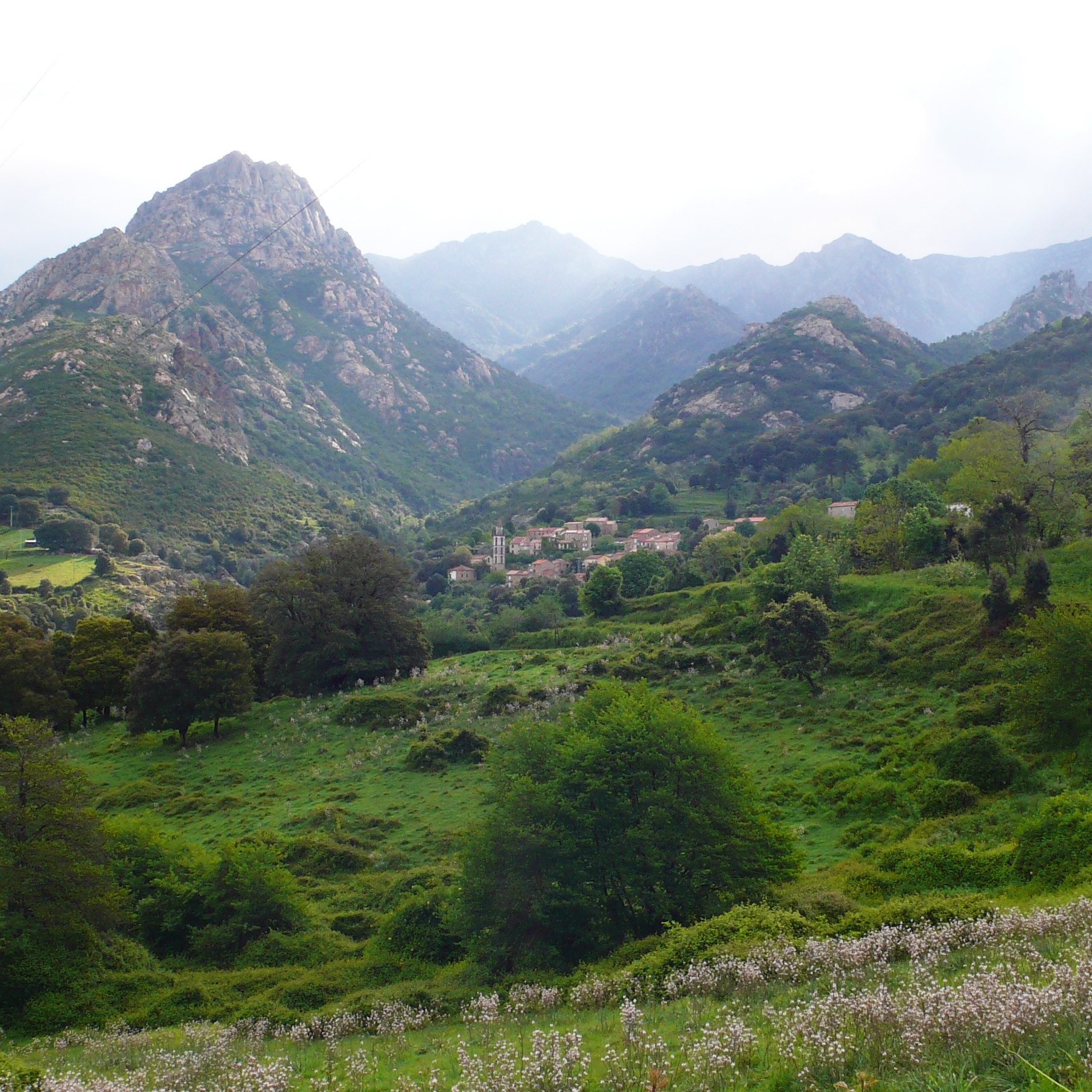 Village de Peri au printemps (mai), vue de la route au fond du vallon de Santa Libarata. Image libre de droit réalisée dans le cadre de la Charte paysagère patrimoniale et architecturale de Peri.